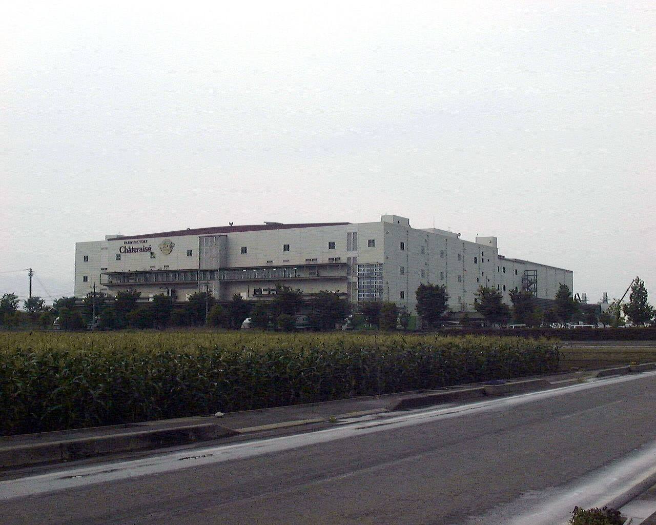 シャトレーゼ豊富工場